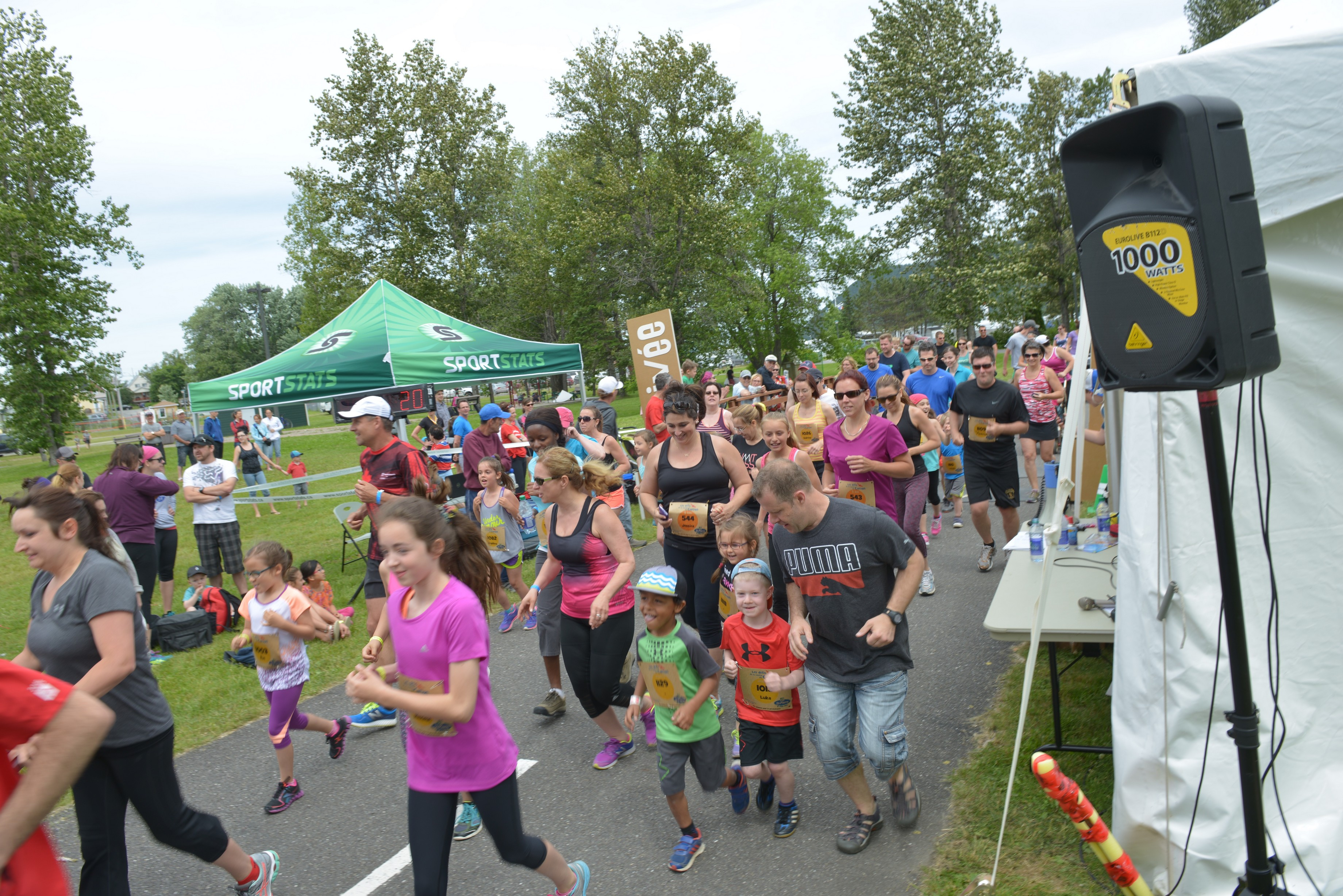 départ course du carton